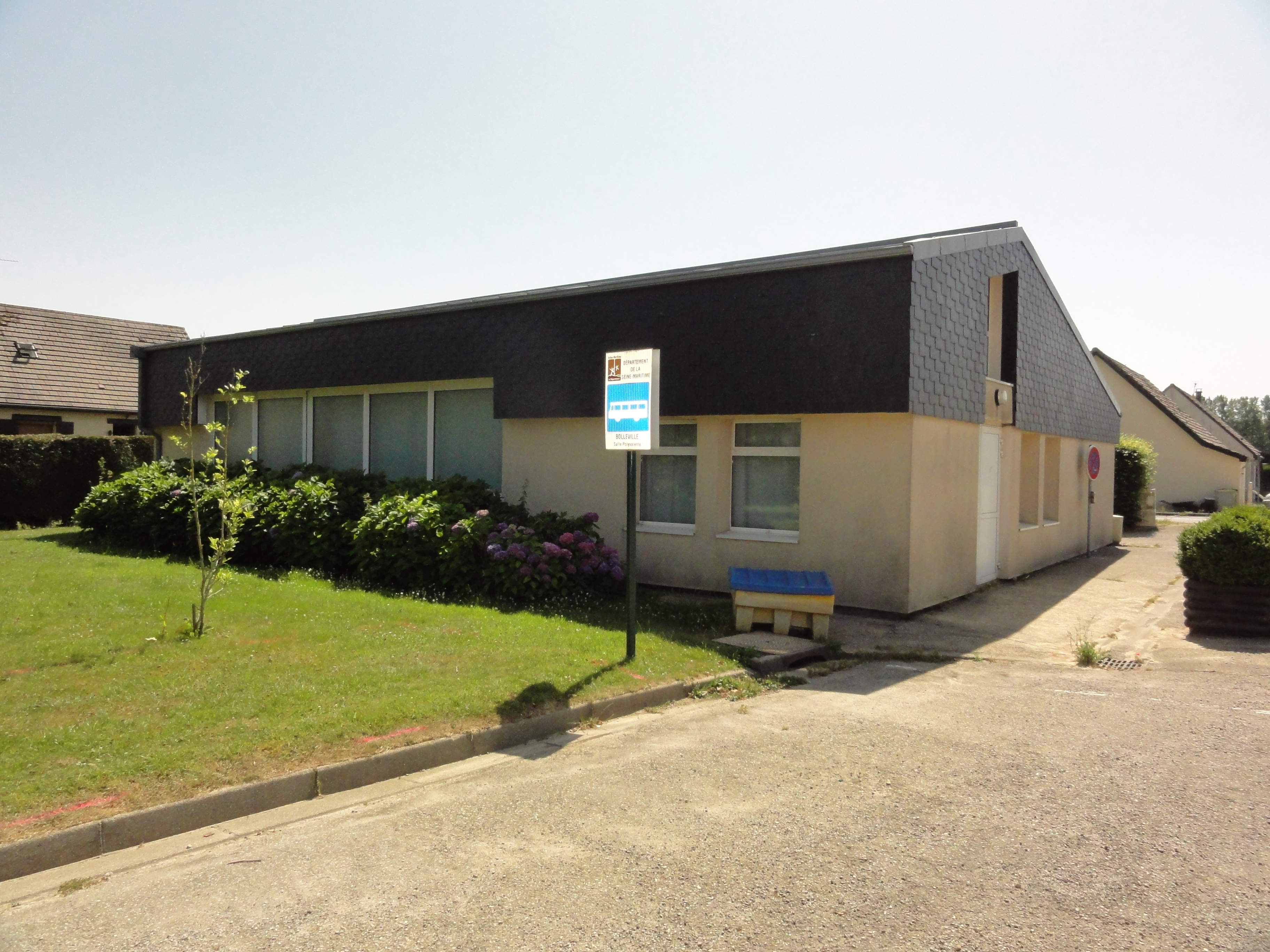 Bolleville (Seine-Mar.) salle polyvalente